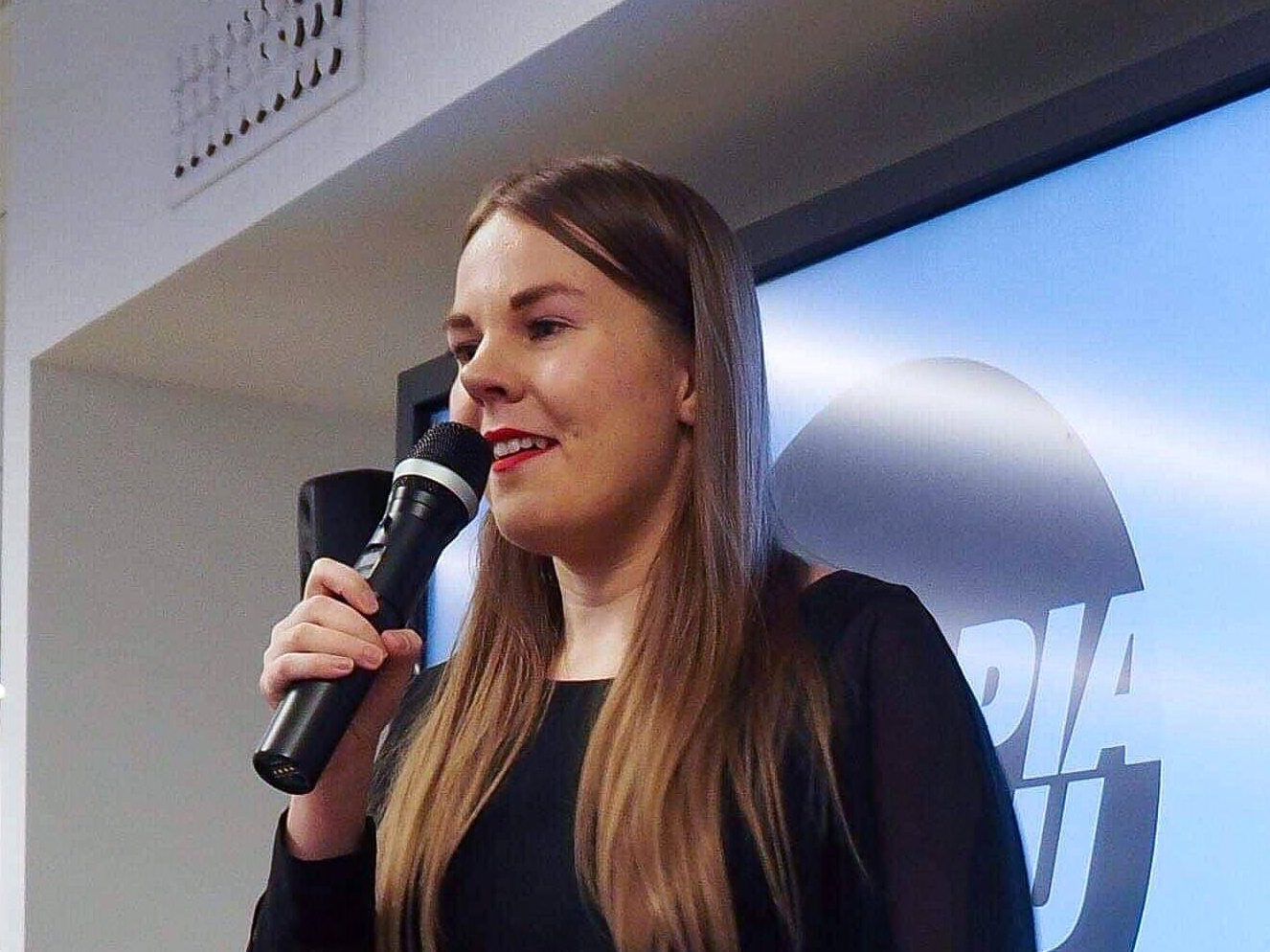 Alviina Alametsä julkaisemassa Terapiatakuu-kansalaisaloitetta 20. helmikuuta 2019.